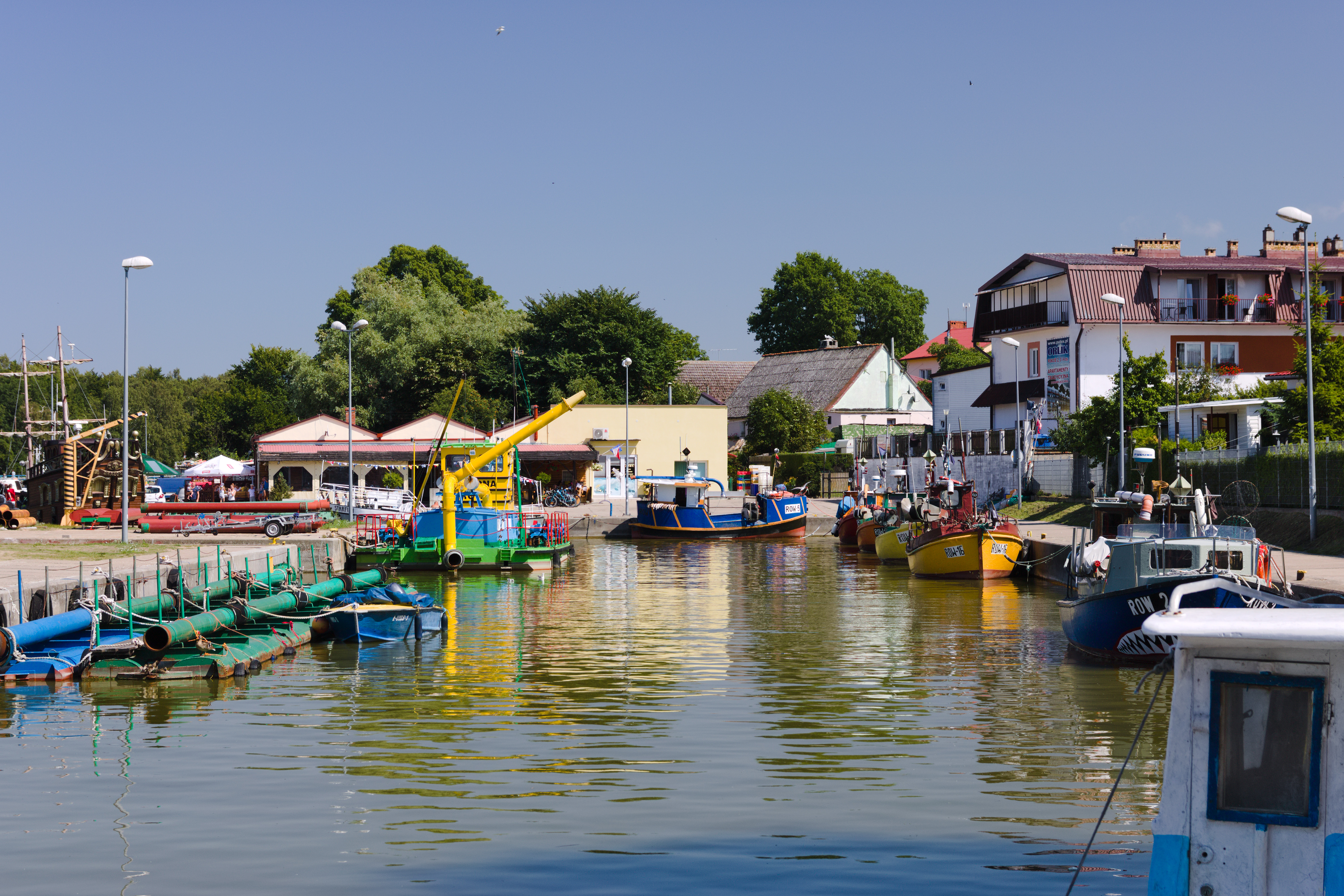 Port morski w Rowach